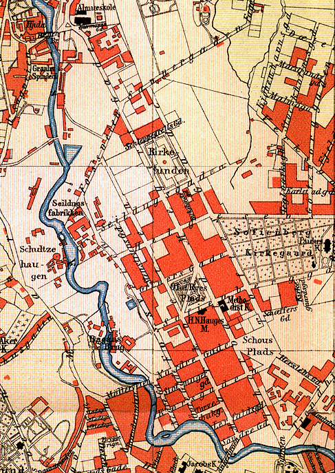 Kart over Grünerløkka, 1887